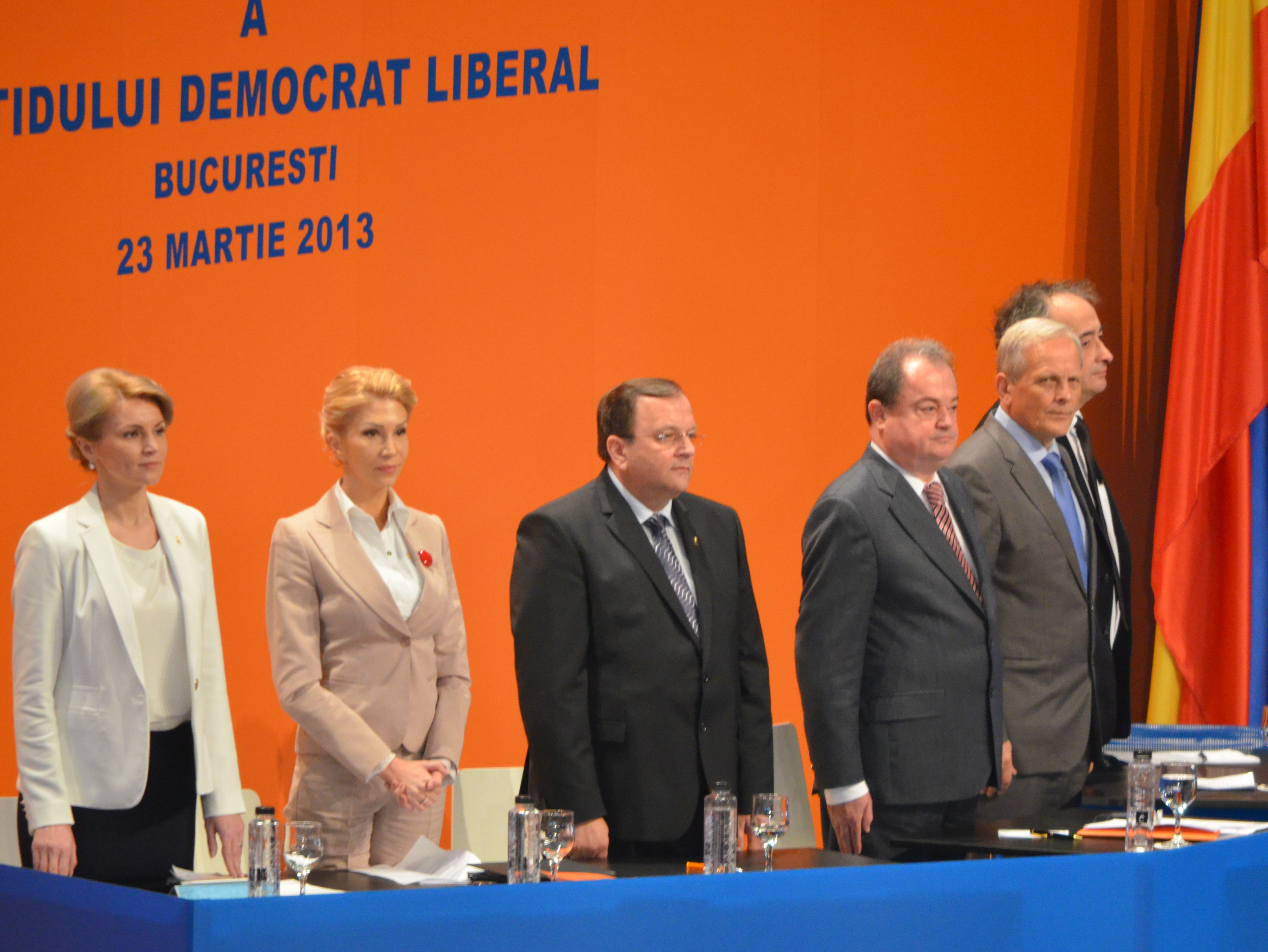 Andreea Paul Vass, Raluca Turcan, Gheorghe Futur, Vasile Blaga, Theodor Stolojan, Traian Ungureanu (la Convenția națională extraordinară a Partidului Democrat-Liberal, 23 martie 2013)